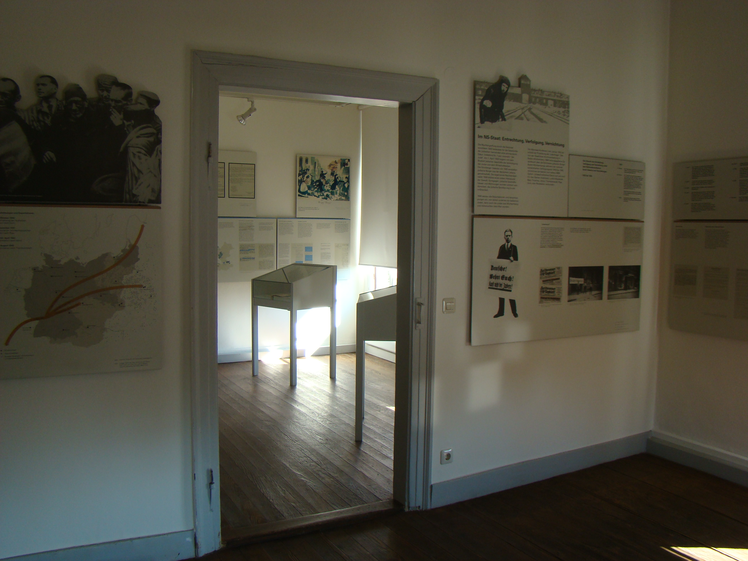 Blick in die Museumsräume der Synagoge in Affaltrach